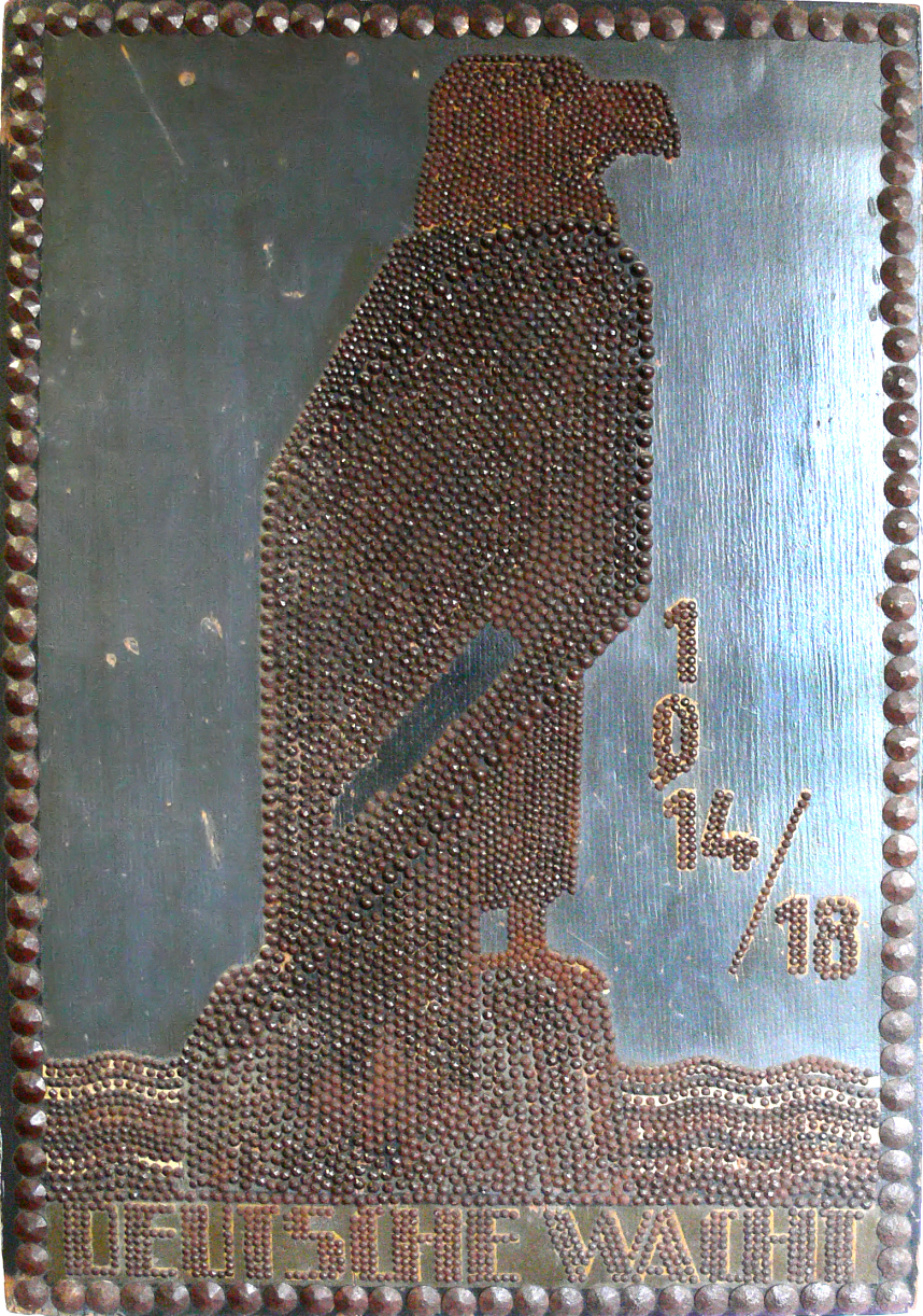 Sammlung Kindheit und Jugend (Stiftung Stadtmuseum Berlin) Nagelbild "Deutsche Wacht 1914-1918" zur Spendensammlung "Jugenddank" in der Schule für Kriegsgeschädigte des 1. Weltkriegs, Leihgabe der 4. Grundschule Pankow, Hersteller: Schulwandtafelfabrik Gottfried Glasmachers, Essen